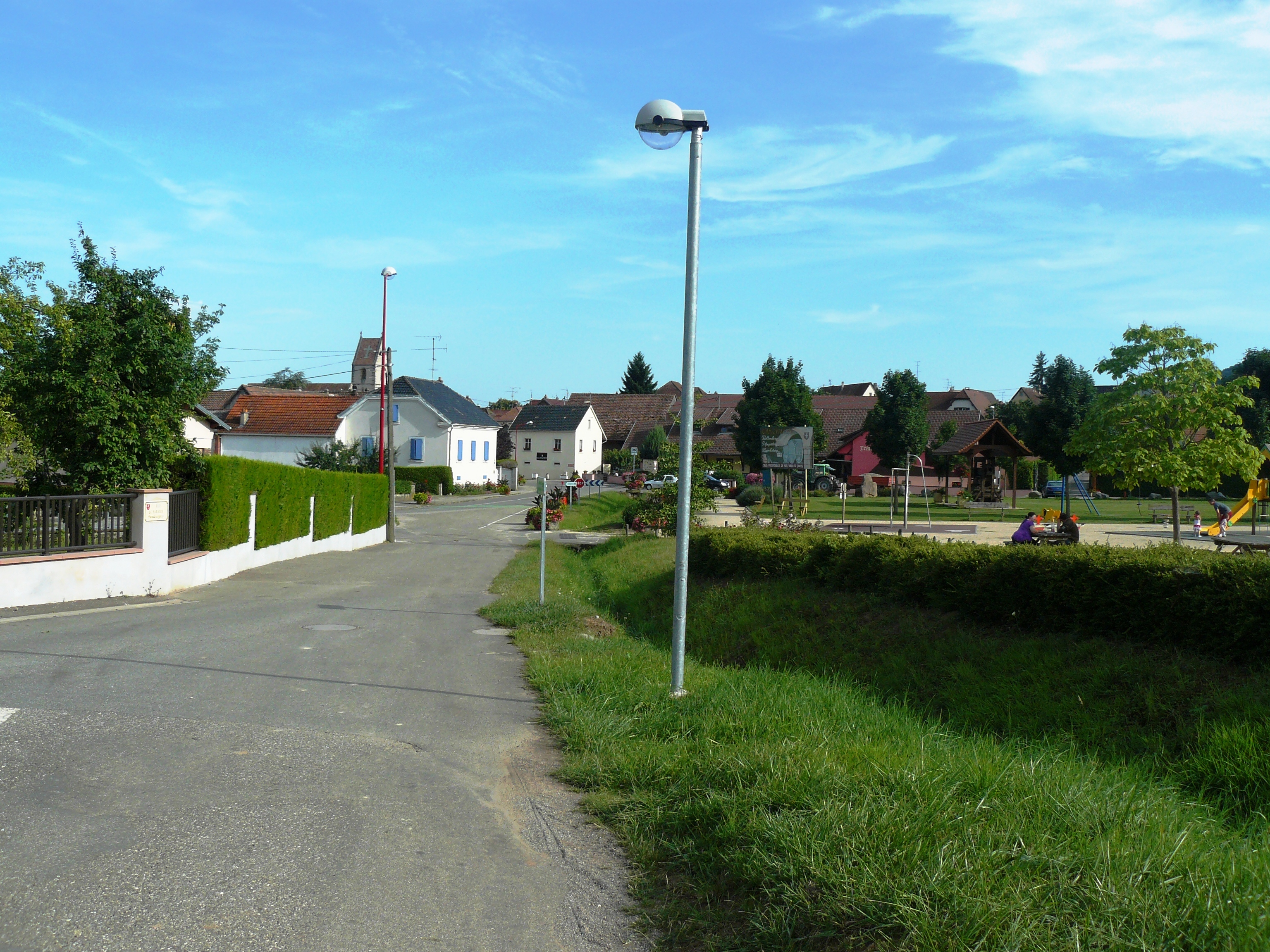 Entrée nord du village d'Orschwihr à coté de l'aire de jeux